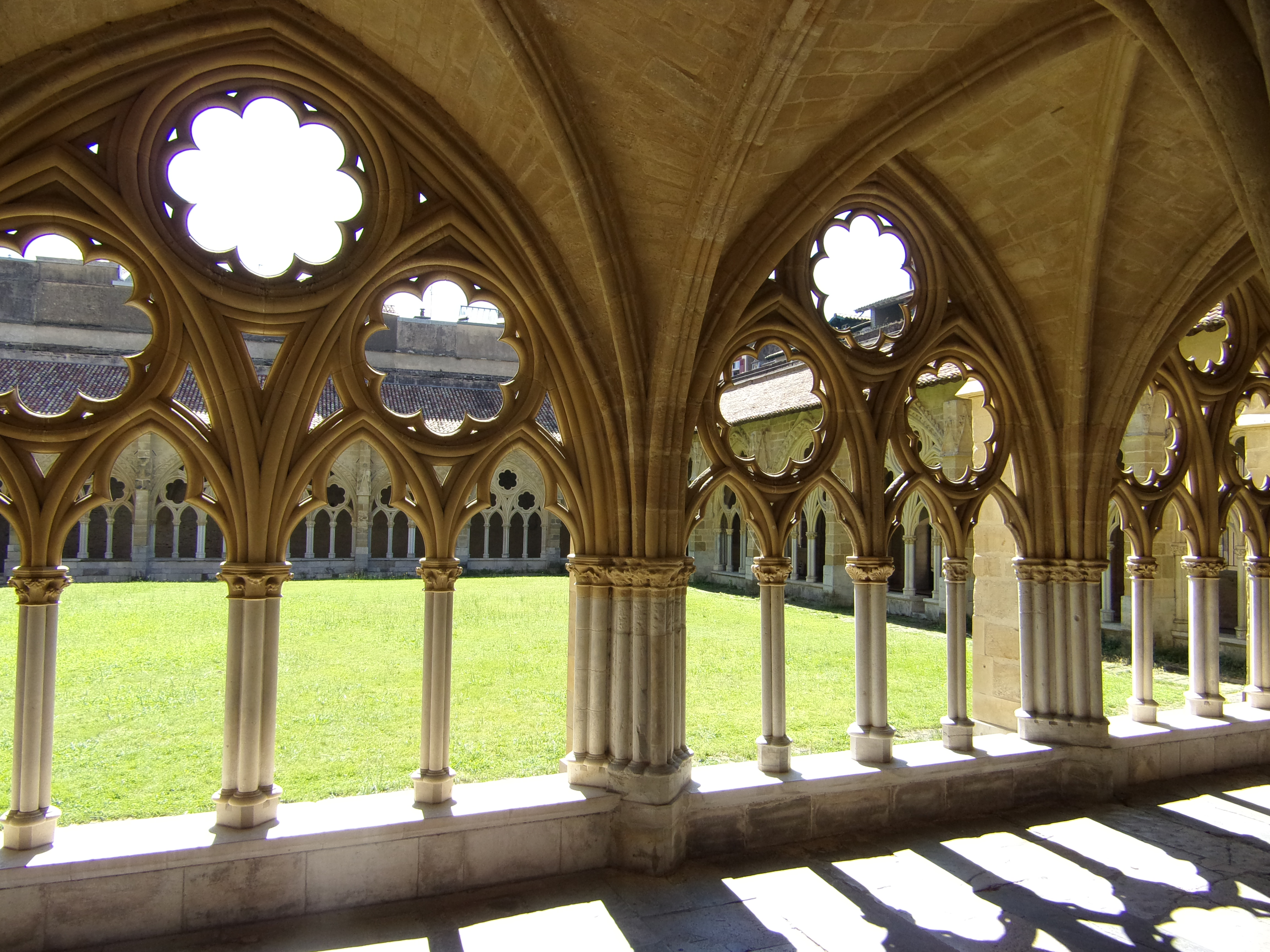 Cloitre de la cathédrale Notre-Dame de Bayonne